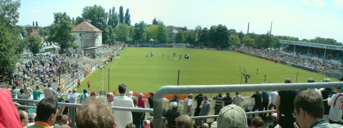 Alfred-Kunze-Sportpark in Leipzig, beim Oberligaspiel FC Sachsen Leipzig gegen CZ Jena Amateure.